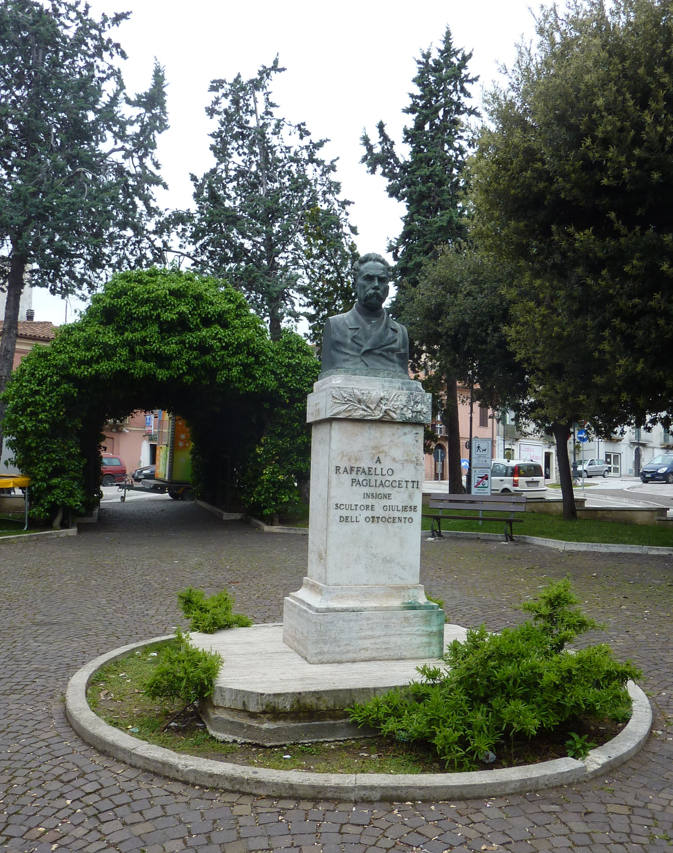 Denkmal für Raffaello Pagliaccetti